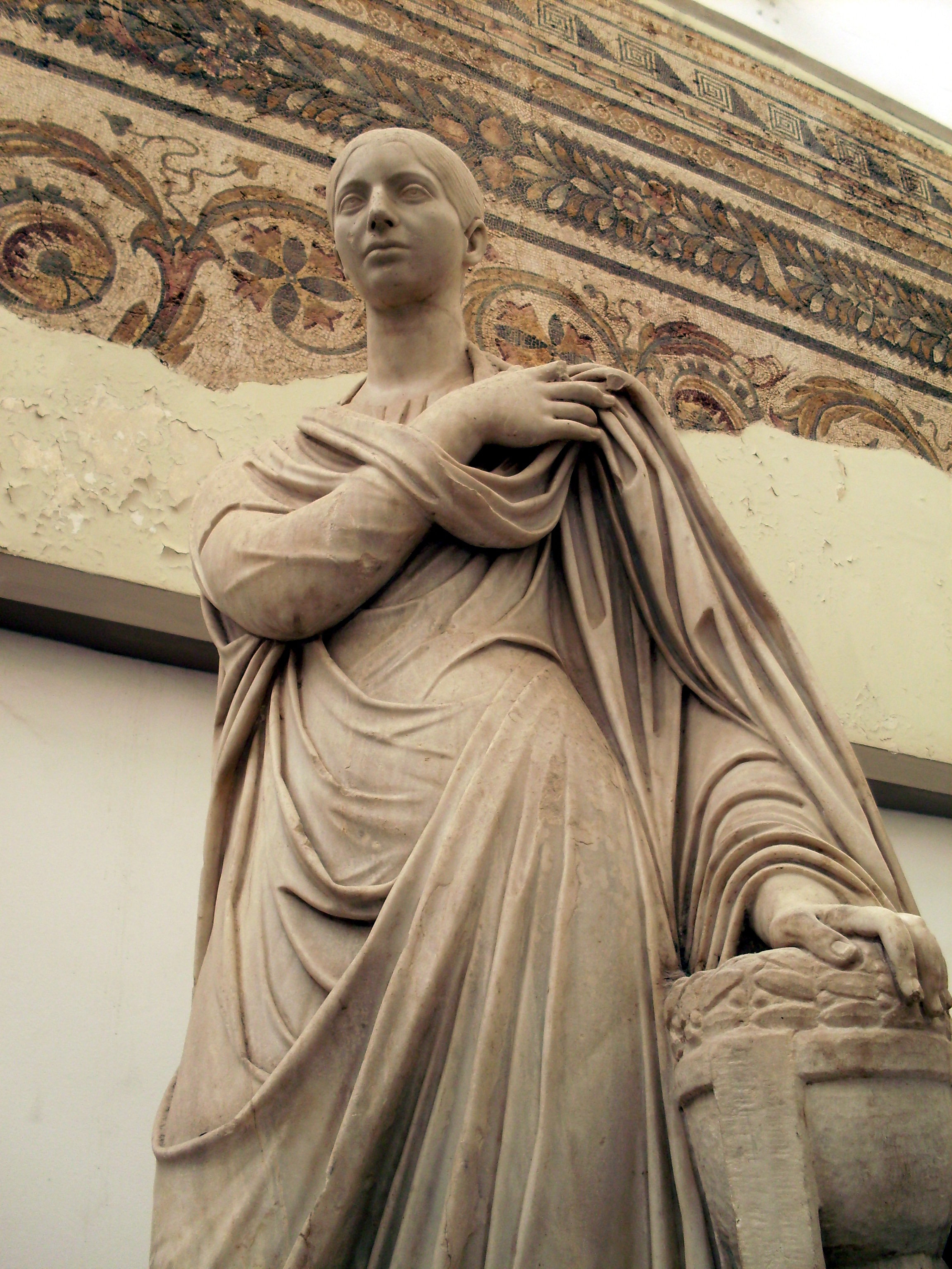 Statue d'une défunte romaine "Crepereia Innula", Haïdra